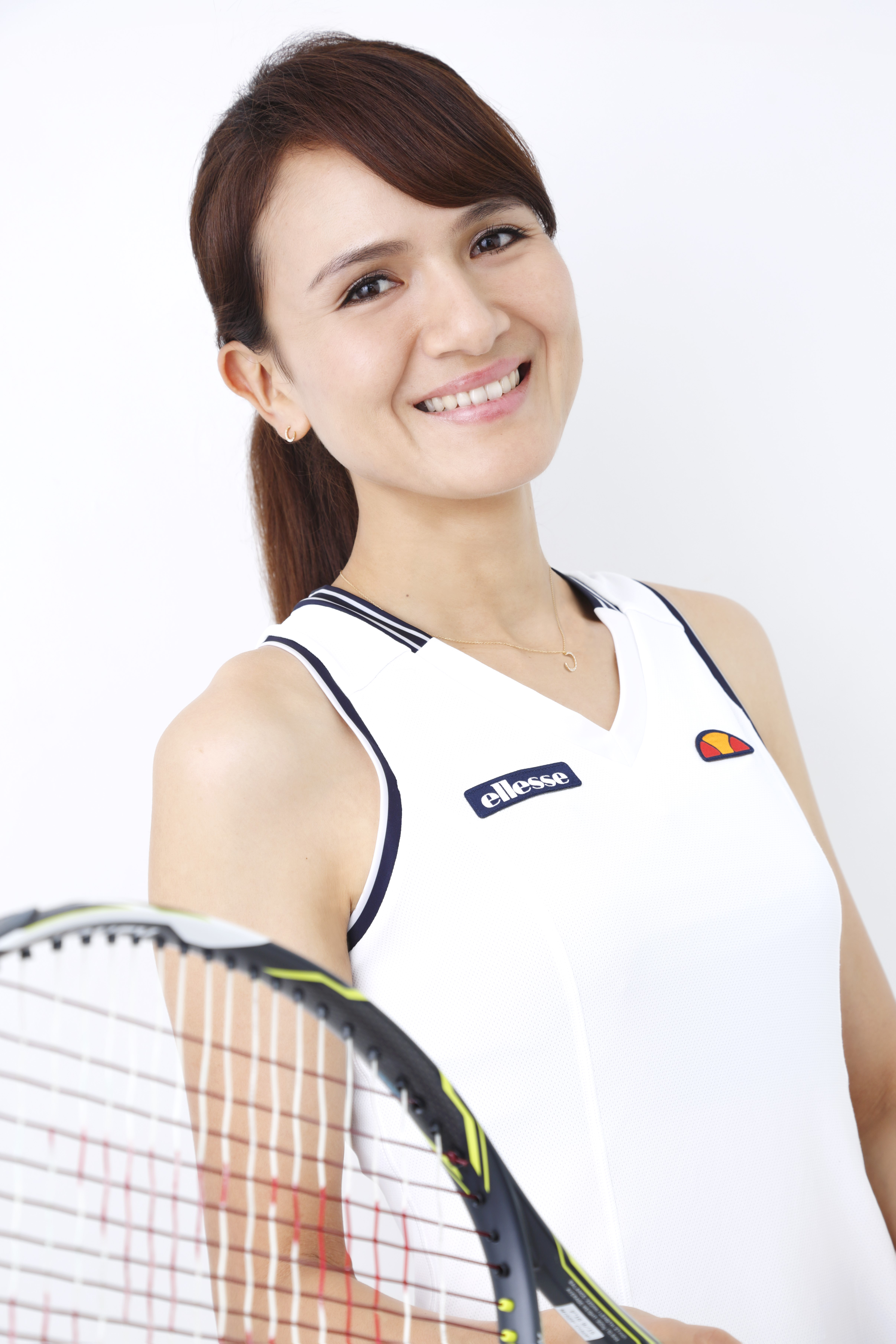 宣材写真